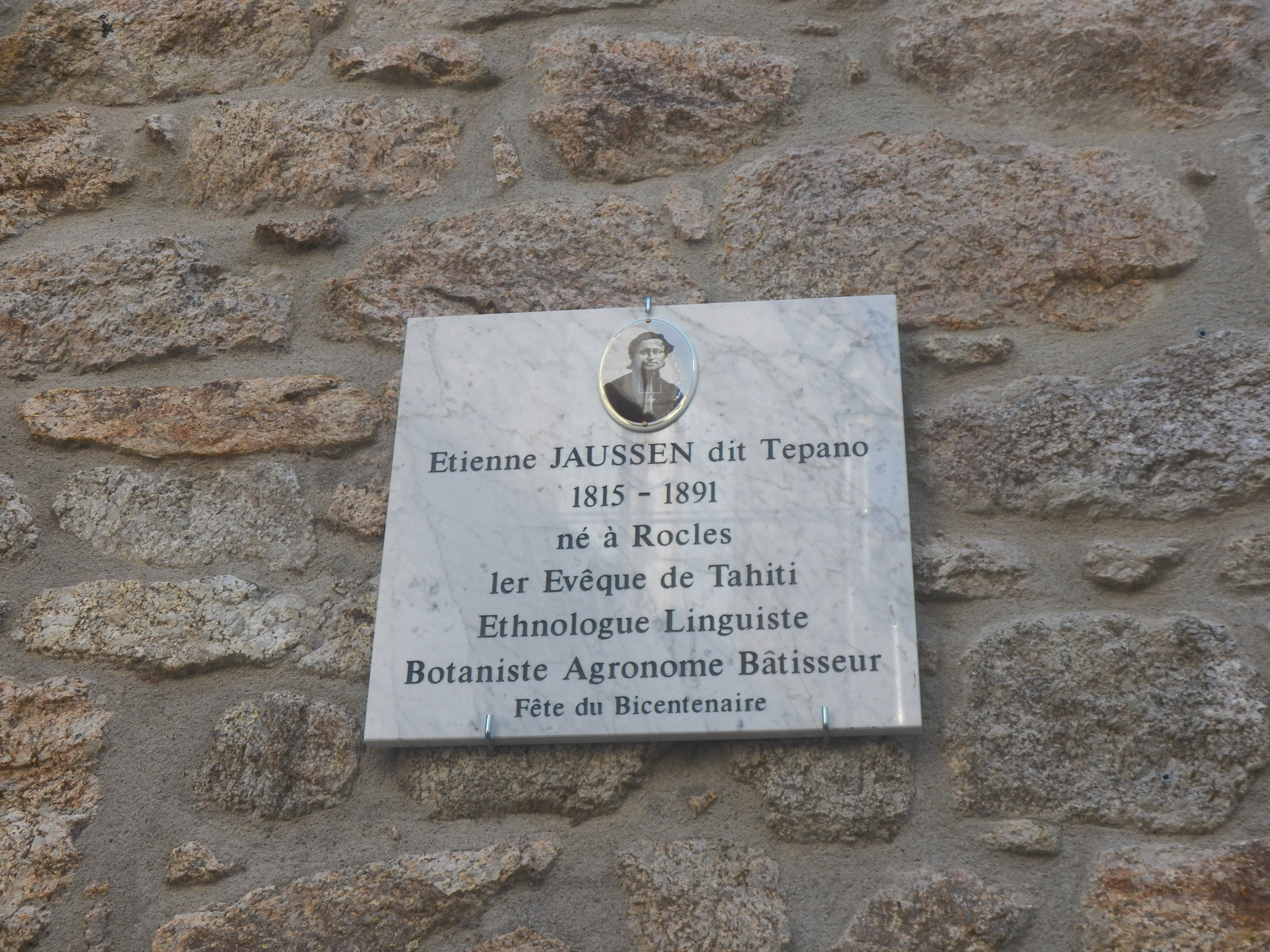 Monseigneur Etienne Jaussen (1815-1895)premier évêque de Tahiti.